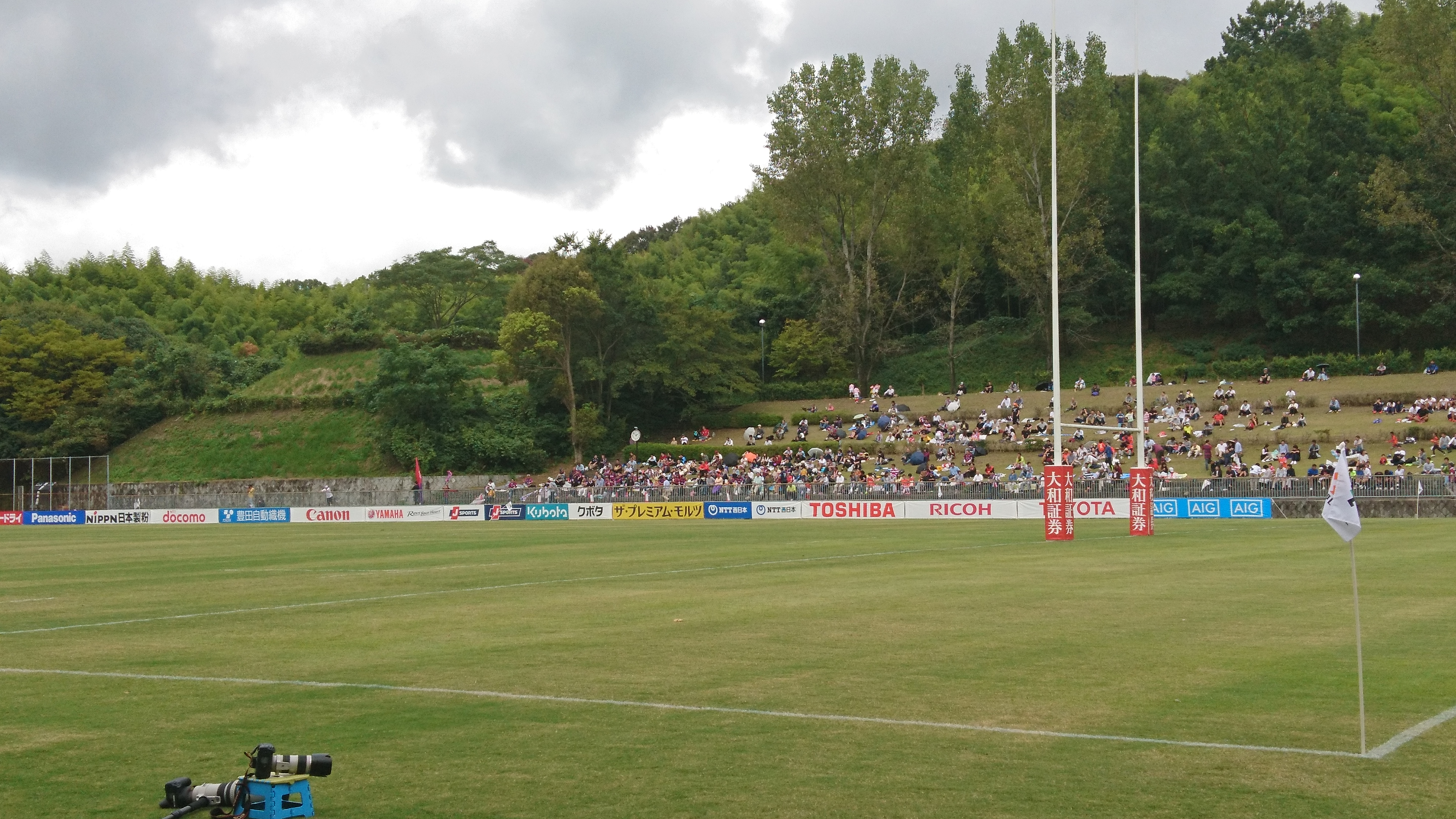 親里競技場にある親里ラグビー場